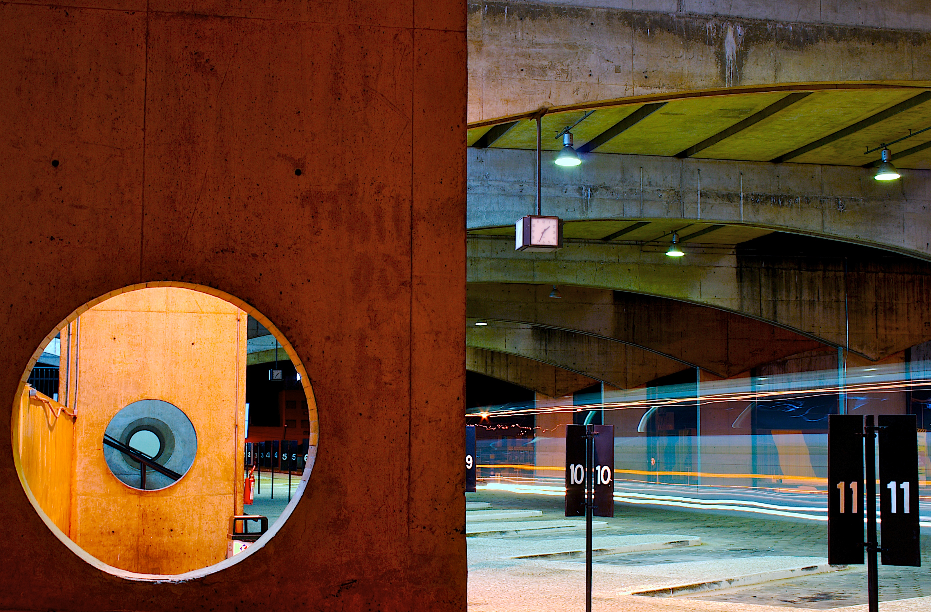 Estação Rodoviária na cidade de São Carlos, SP, Brasil.